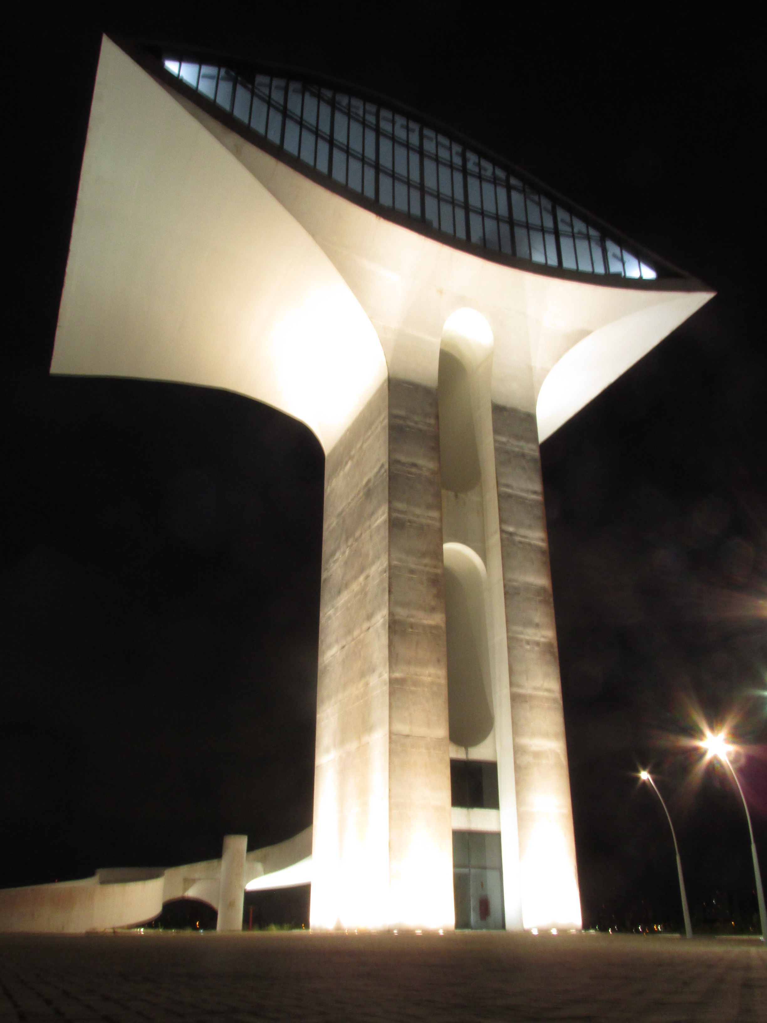 Parque Dom Nivaldo Monte, Natal, Brasil